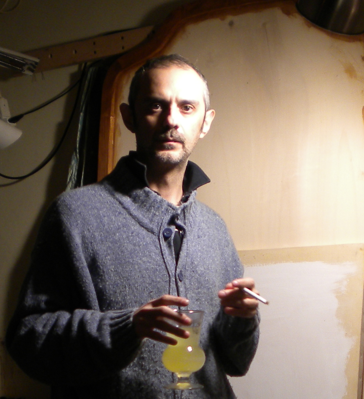 autoritratto di Davide Reviati